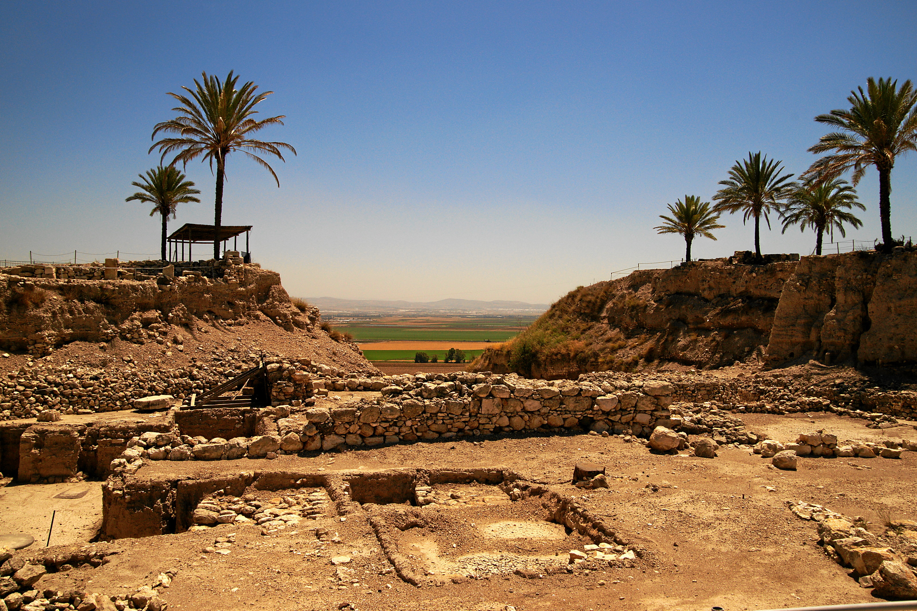 Tel Megiddo: Heiliger Bezirk (Sacred Area)